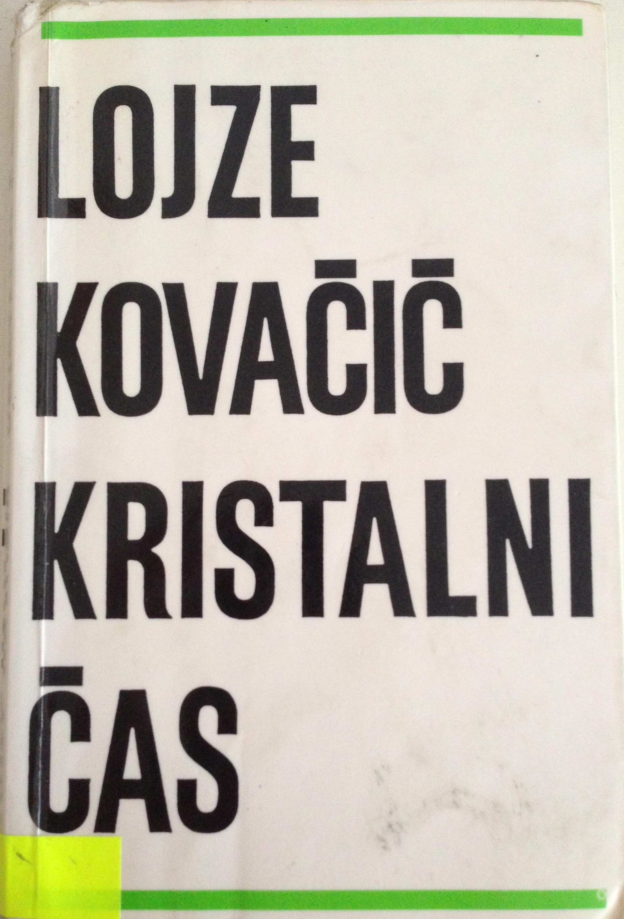 Naslovnica romana Kristalni čas Lojzeta Kovačiča.